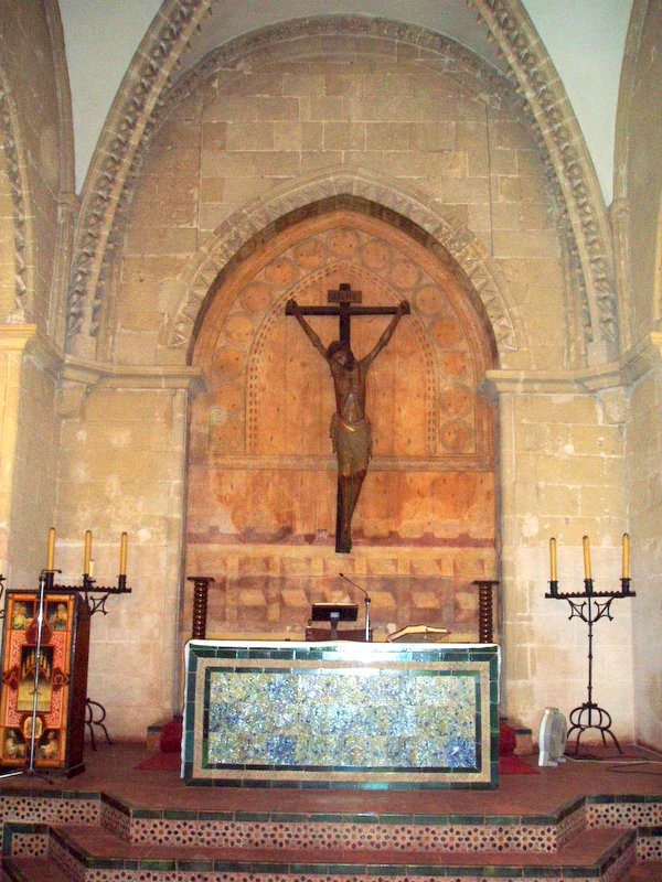 Cristo en La Rábida, provincia de Huelva, España.